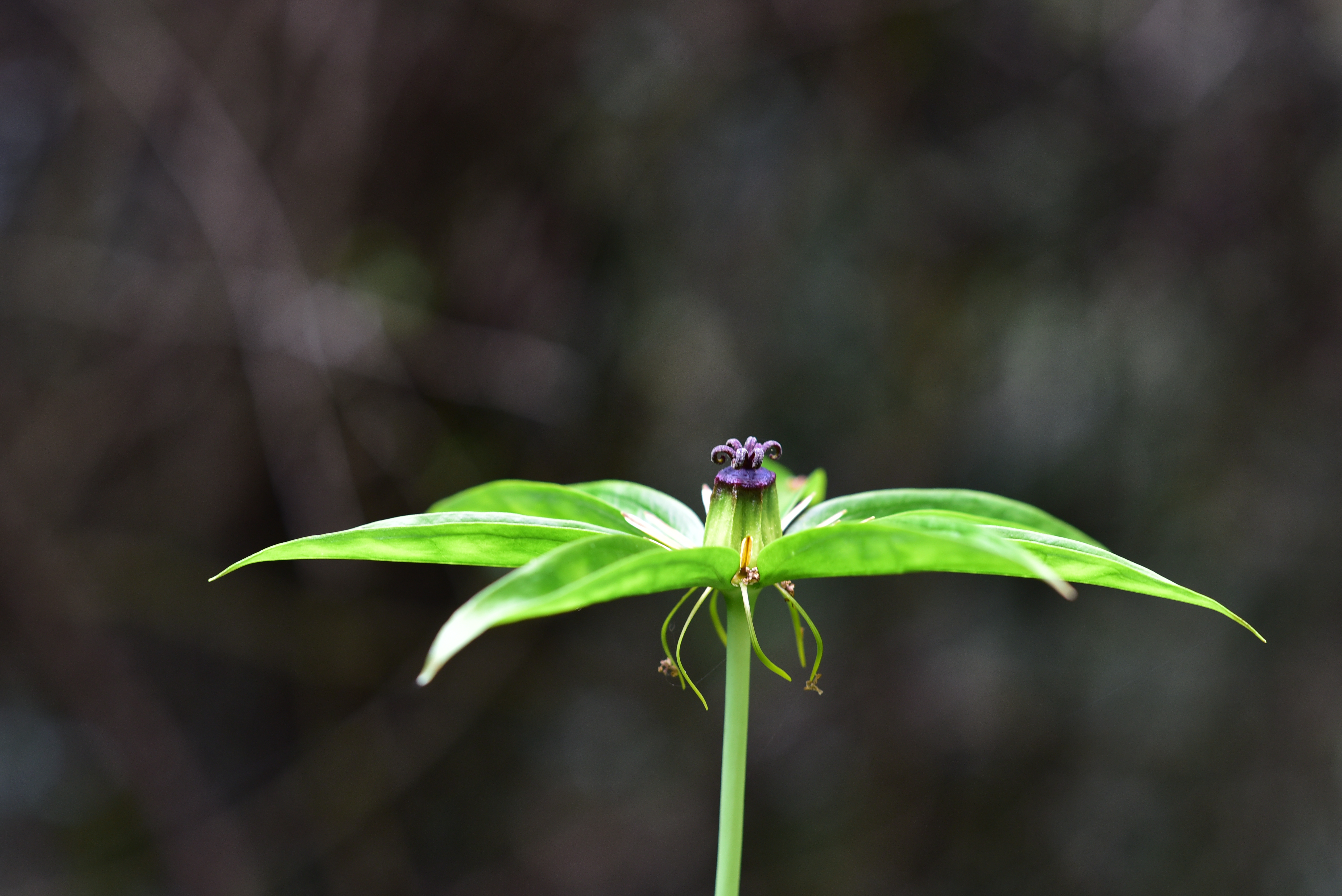 Paris polyphylla in Taiwan 2018 七葉一枝花 台灣霞喀羅古道2018